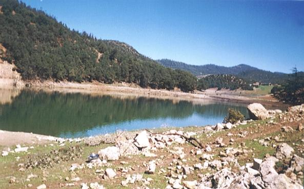 licence GFDL photo: personnelle Hadraj Said